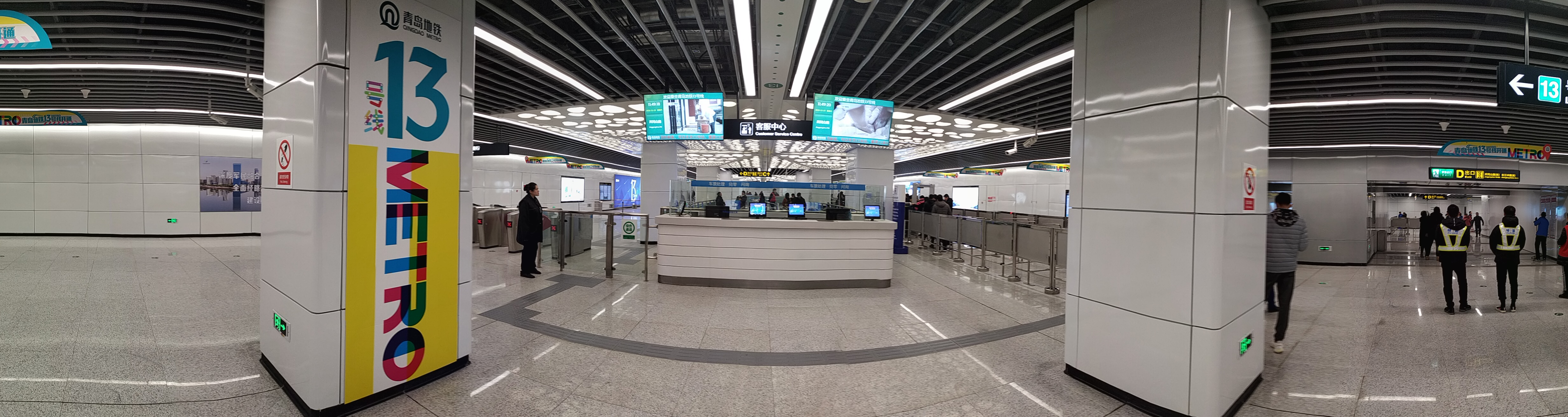 井冈山路站站厅